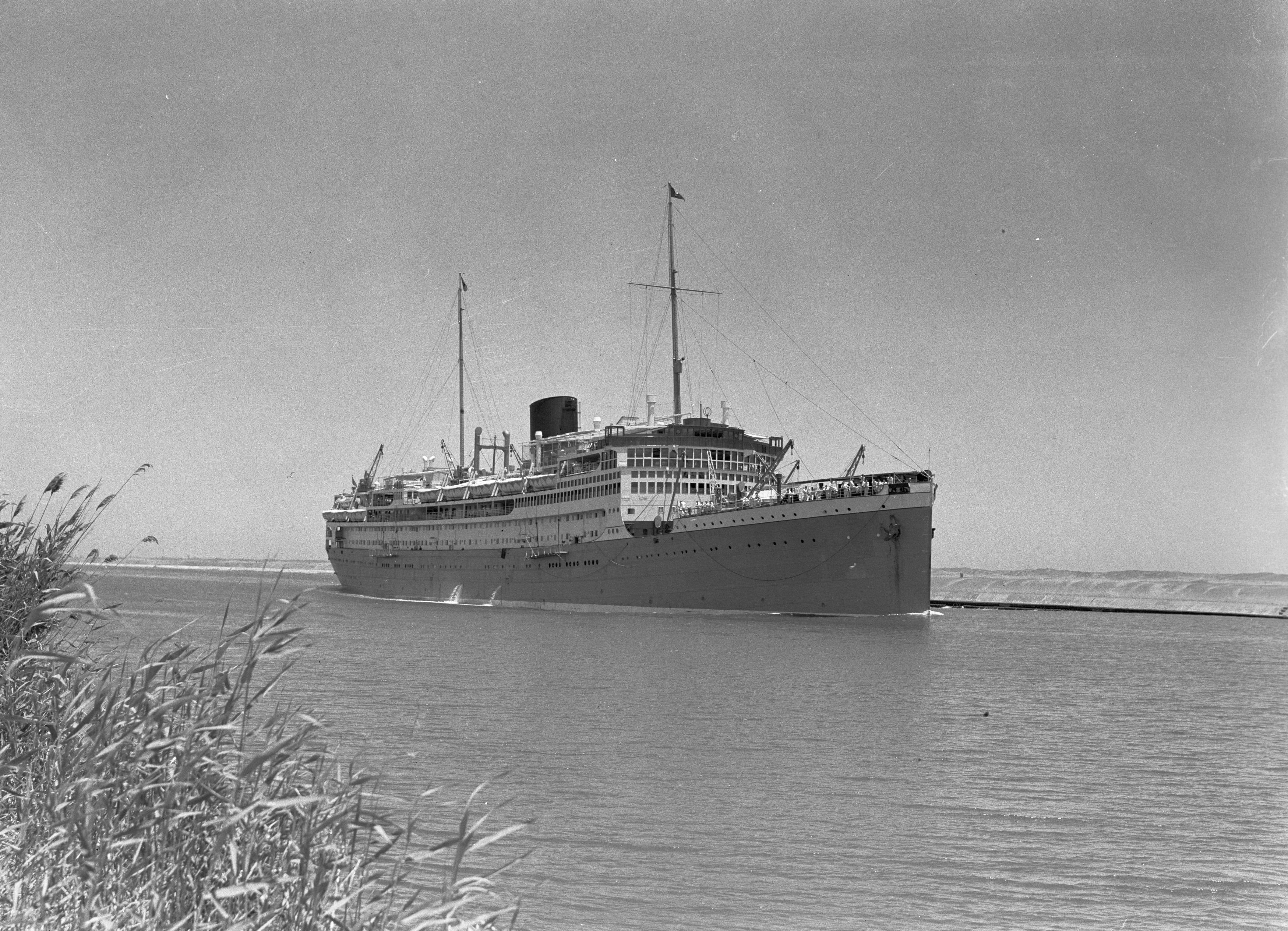 Collectie / Archief : Fotocollectie Van de Poll Reportage / Serie : Zeereis met MS Baloeran Beschrijving : Het passagiersschip Baloeran in het Suez-kanaal Annotatie : Deze foto maakt deel uit van een serie foto's van een reis met de MS Baloeran van de Rotterdamse Lloyd Datum : 1 januari 1935 Locatie : Egypte, Port Said, Suezkanaal Trefwoorden : kanalen, passagiersschepen Fotograaf : Poll, Willem van de Auteursrechthebbende : Nationaal Archief Materiaalsoort : Glasnegatief Nummer archiefinventaris : bekijk toegang 2.24.14.02 Bestanddeelnummer : 191-0044